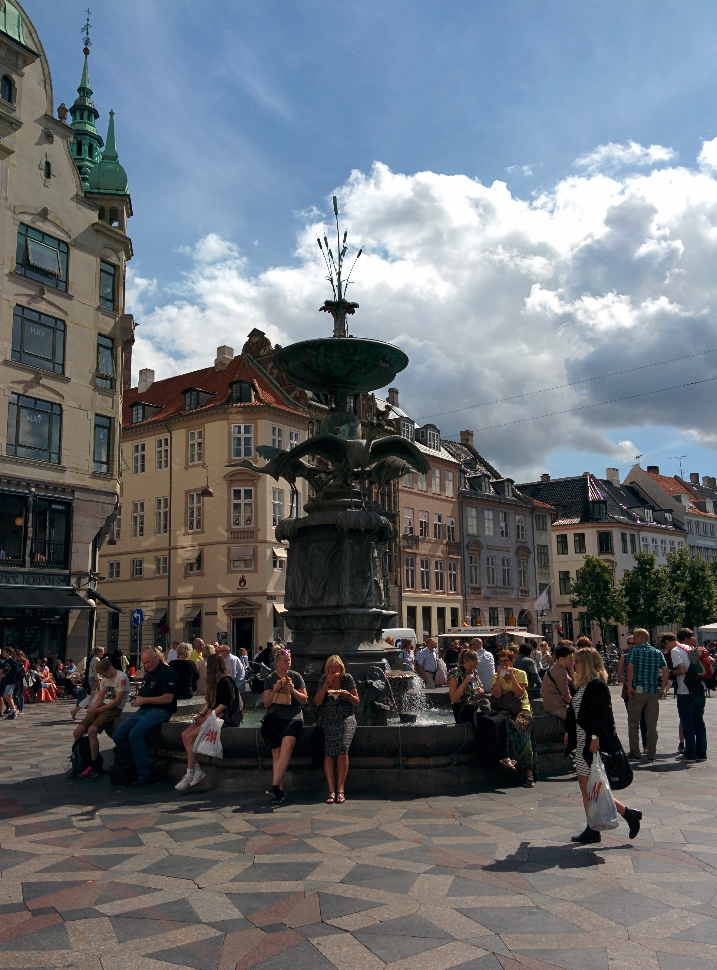 tHE sTORK fOUNTAIN IN Copenhagen, dENMARK